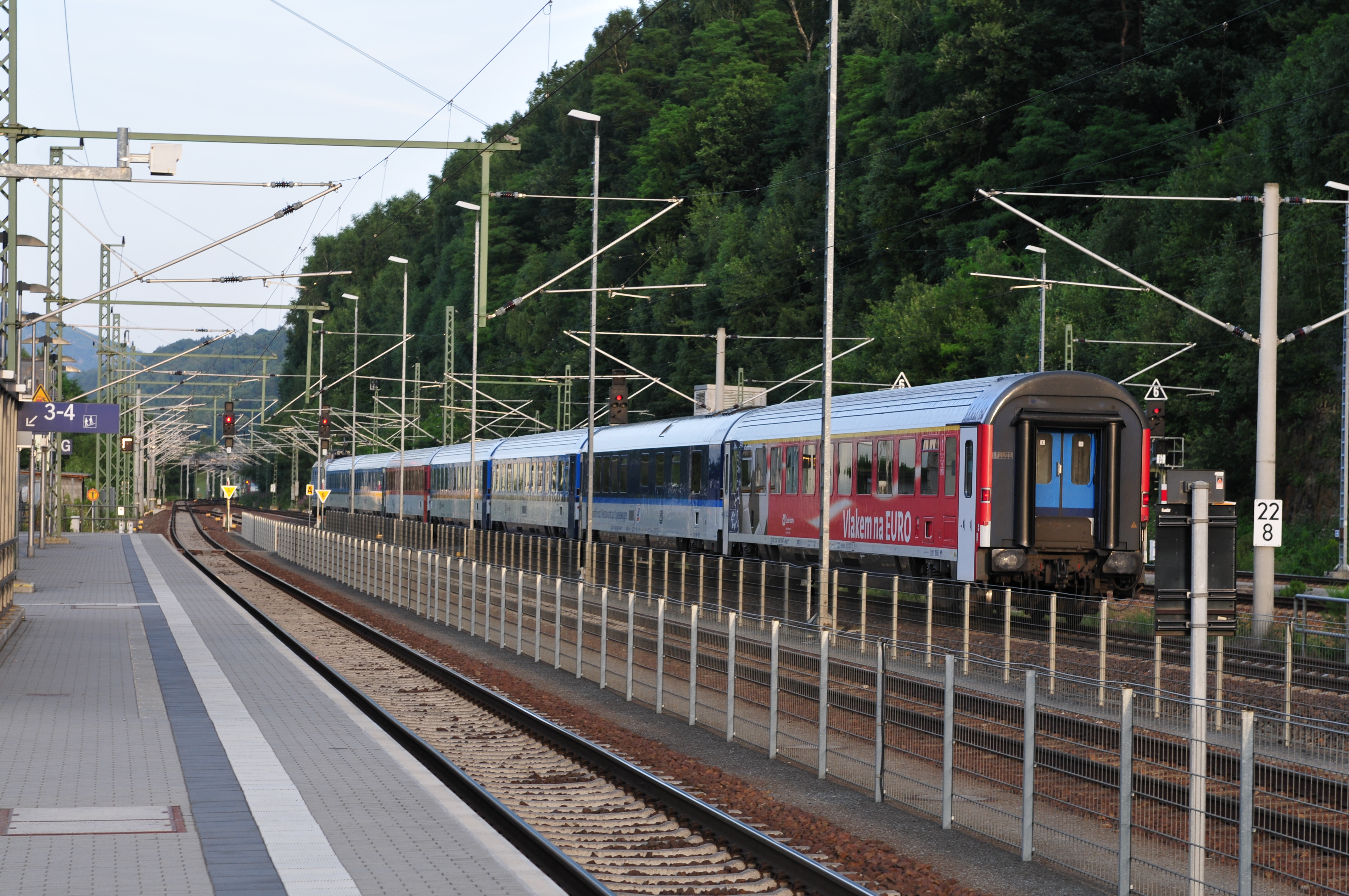 Bahnhof Bad Schandau